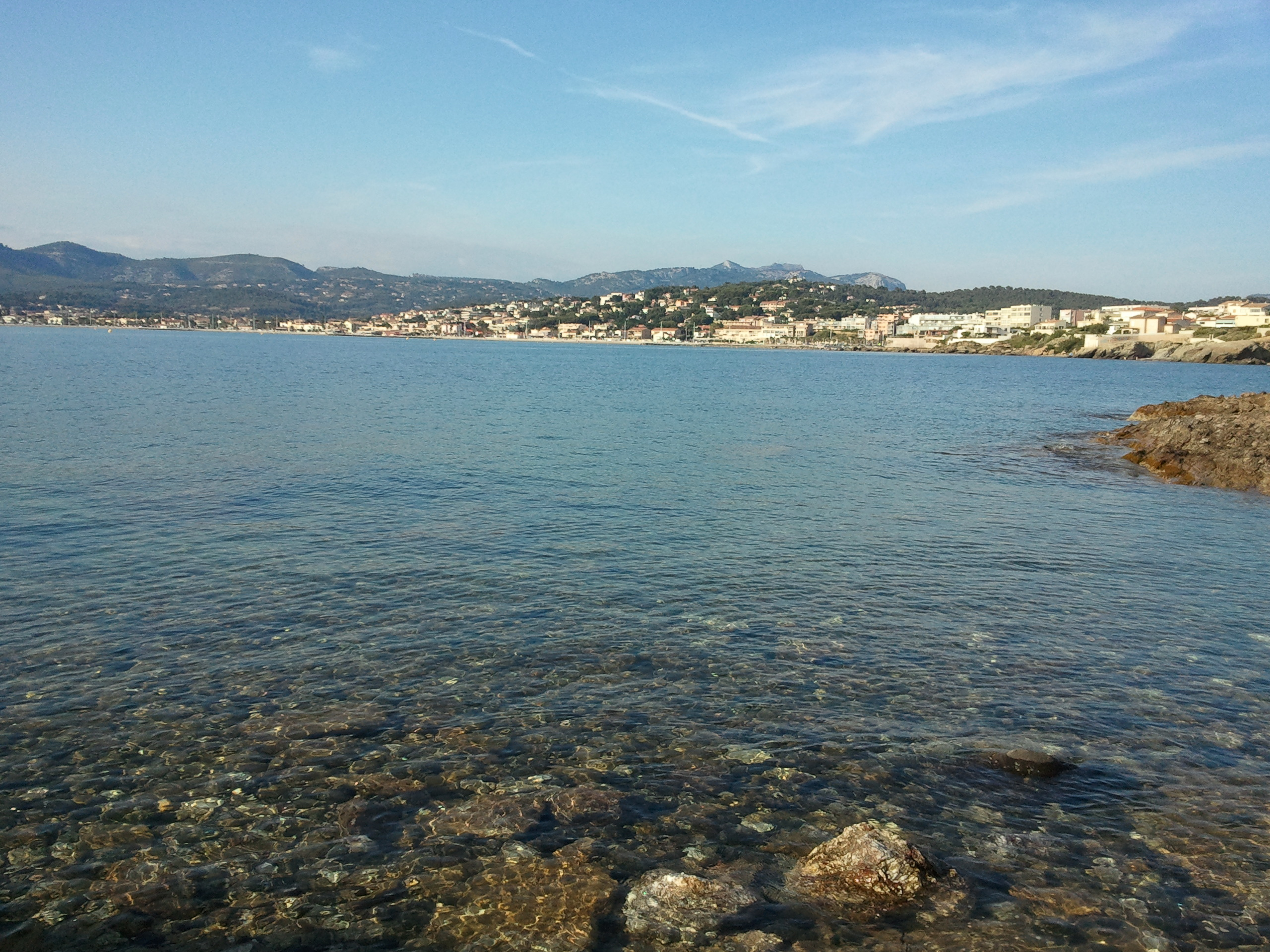 Vue depuis le Parc de la Méditerranée